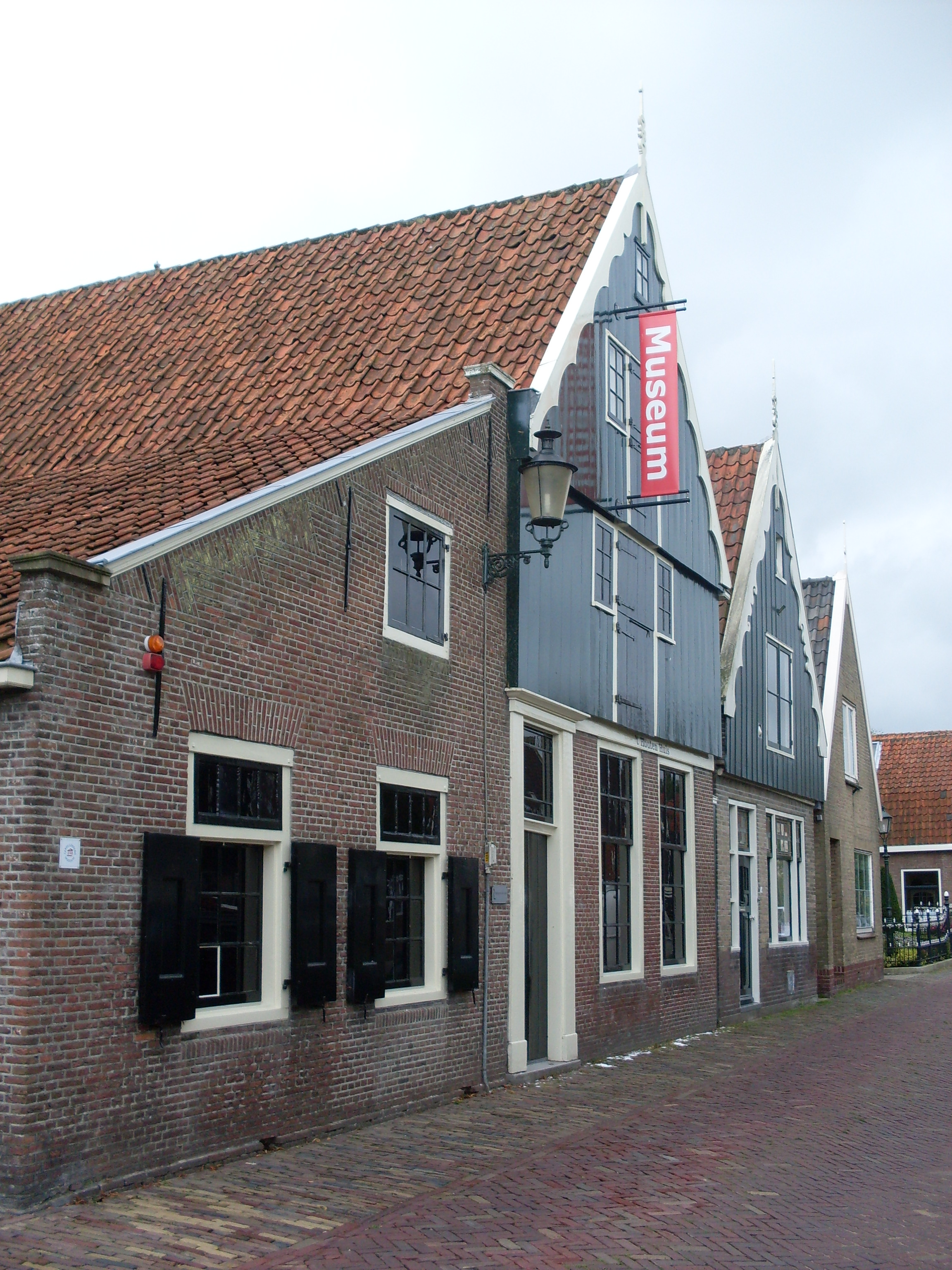 Wees- en Armenhuis in De Rijp.